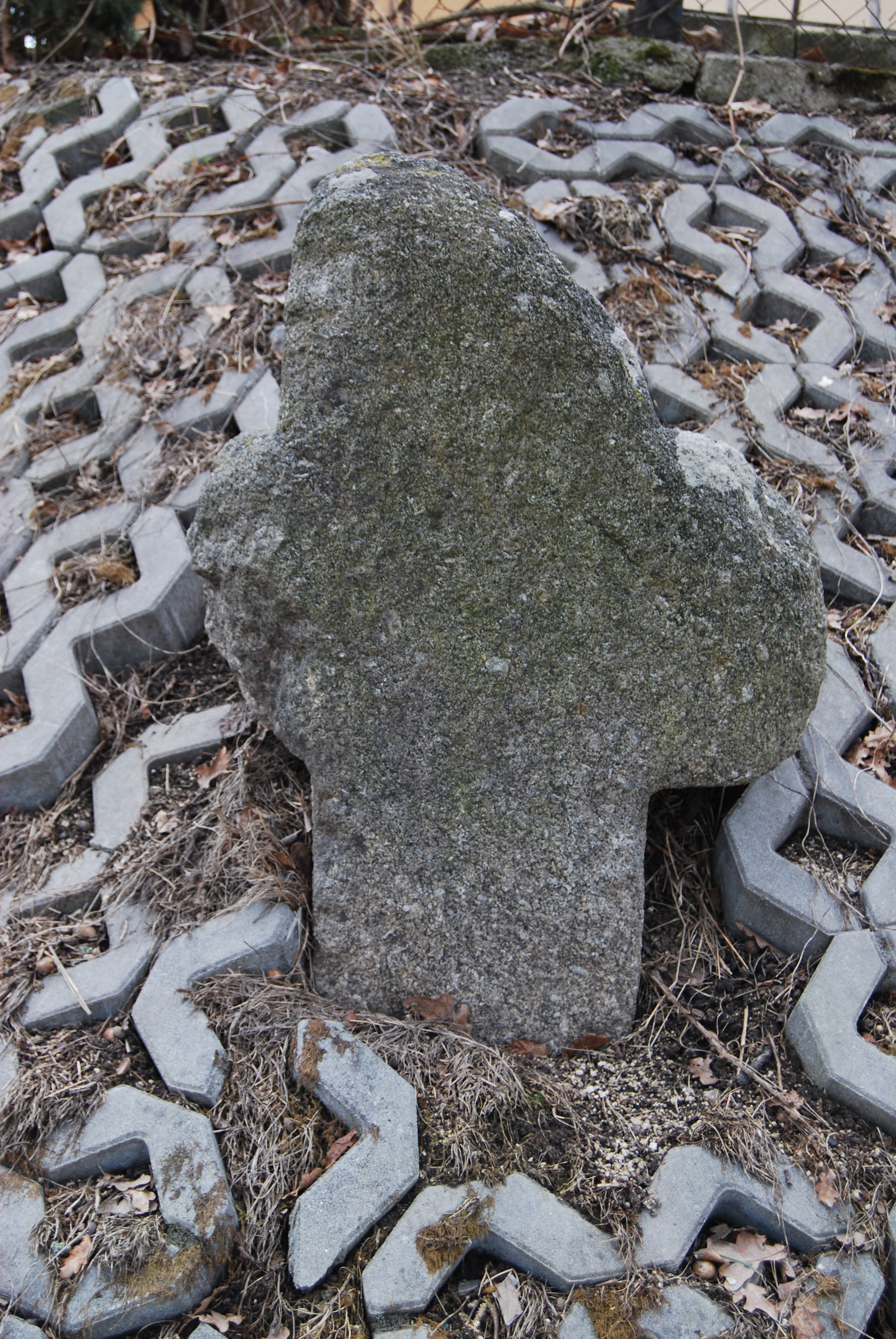 Smírčí kříž v Sokolovské ulici v Milevsku. Milevsko. Okres Písek. Česká republika. Tento smírčí kříž se nachází přímo v Milevsku, ve svahu před zahrádkou. Na tomto místě byl podle pověsti zavražděn nehodný, zlý, škodolibý a peněz chtivý Vlach, který zde přepadal a děsil pokojné poutníky, kráčející do kláštera.